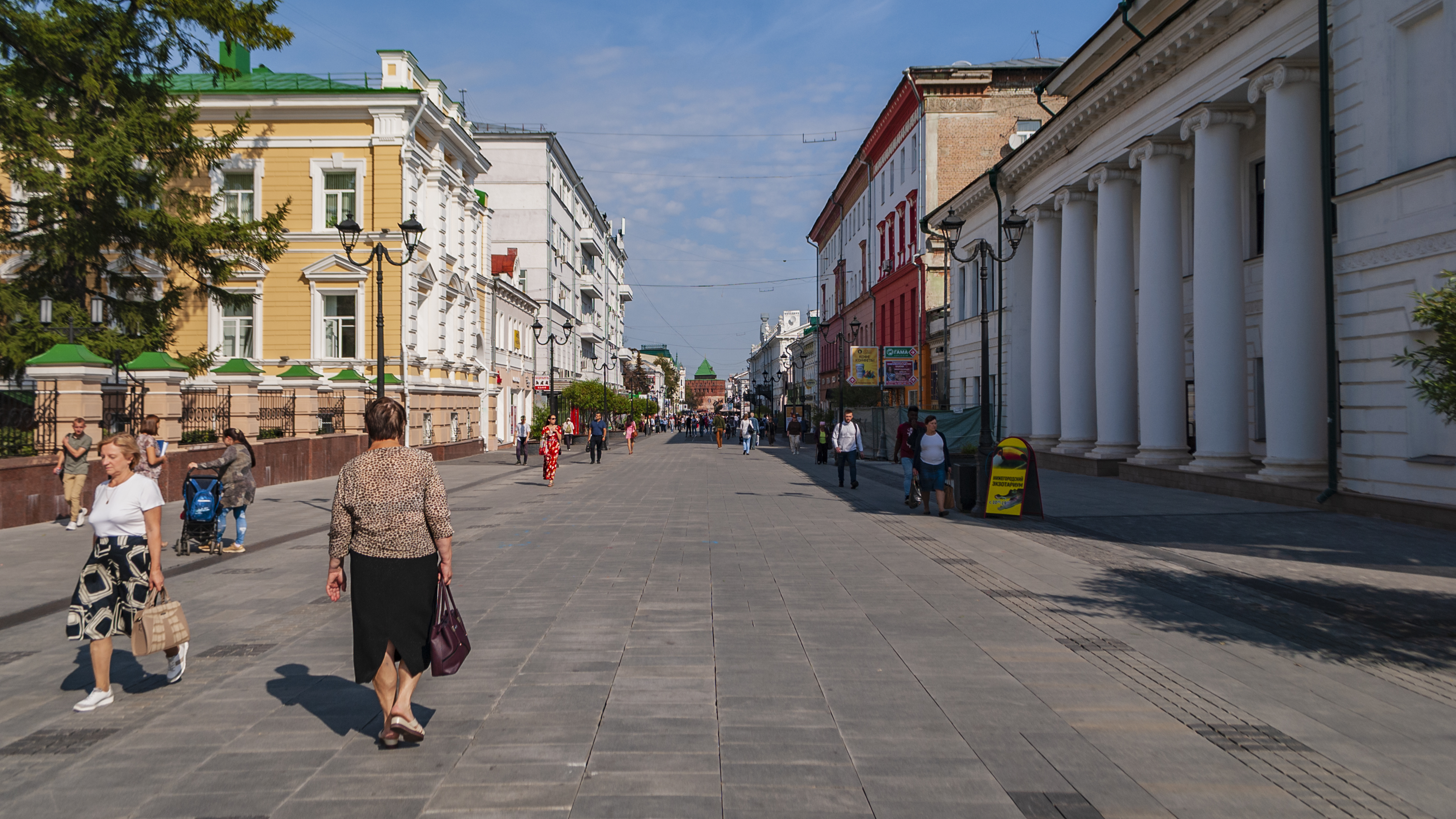 Большая Покровская улица в Нижнем Новгороде